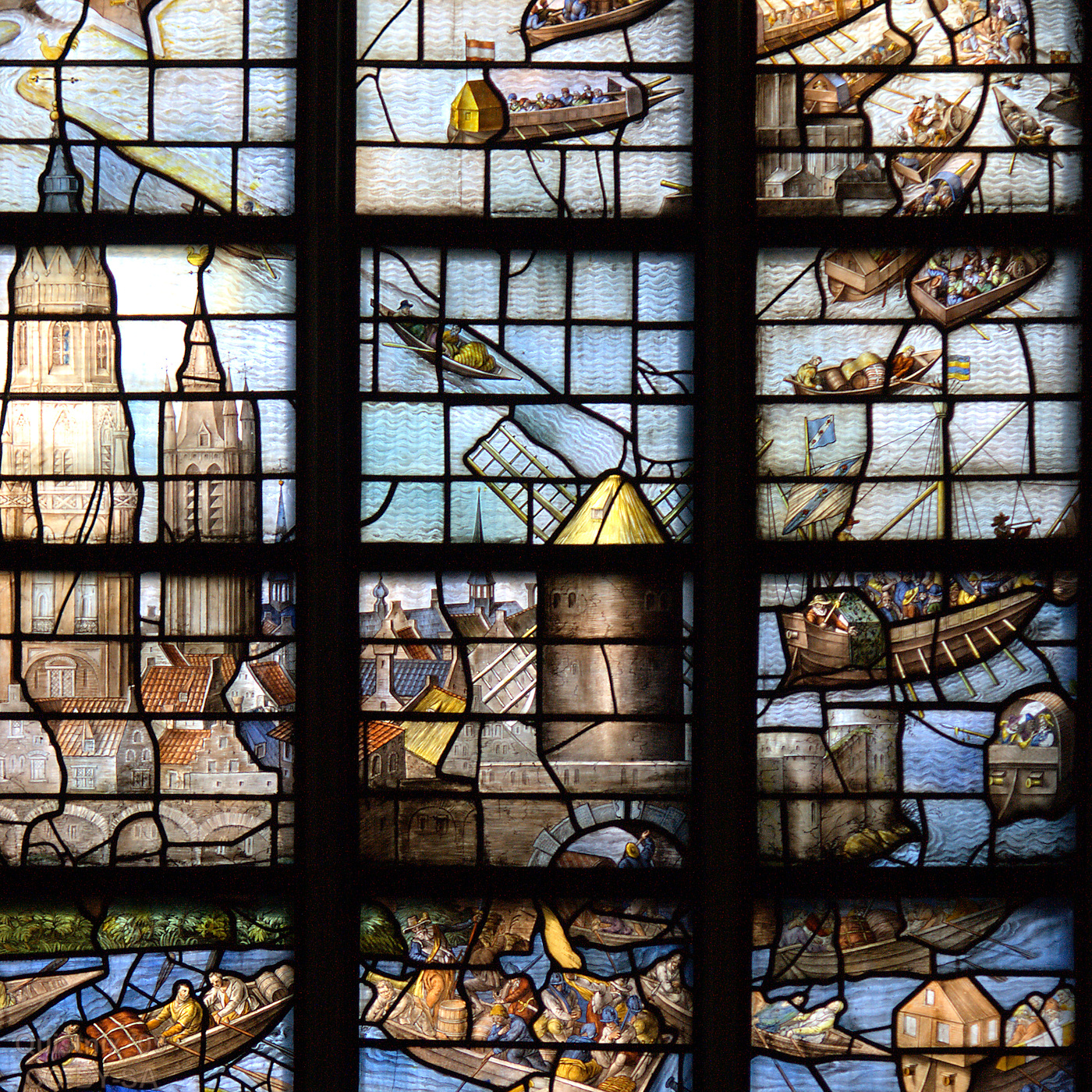 Gouda, Sint Janskerk: Goudse Glazen - Leidens ontzet, Delft met Duyvelsgatmolen